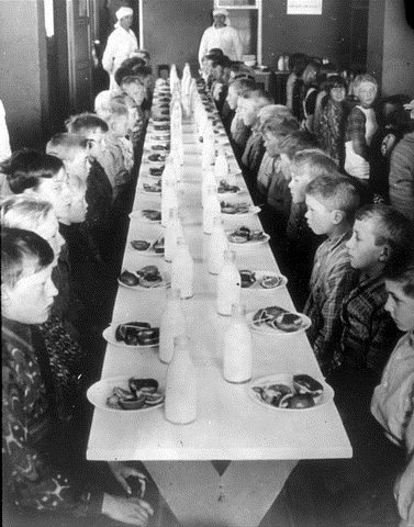 Skole i Oslo. Eier: Oslo byarkiv.